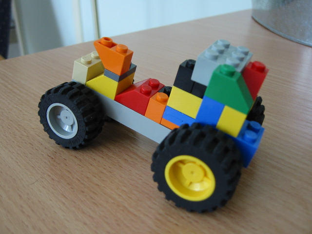 Un tractor construit din piese de LEGO.Niksun traktori-design